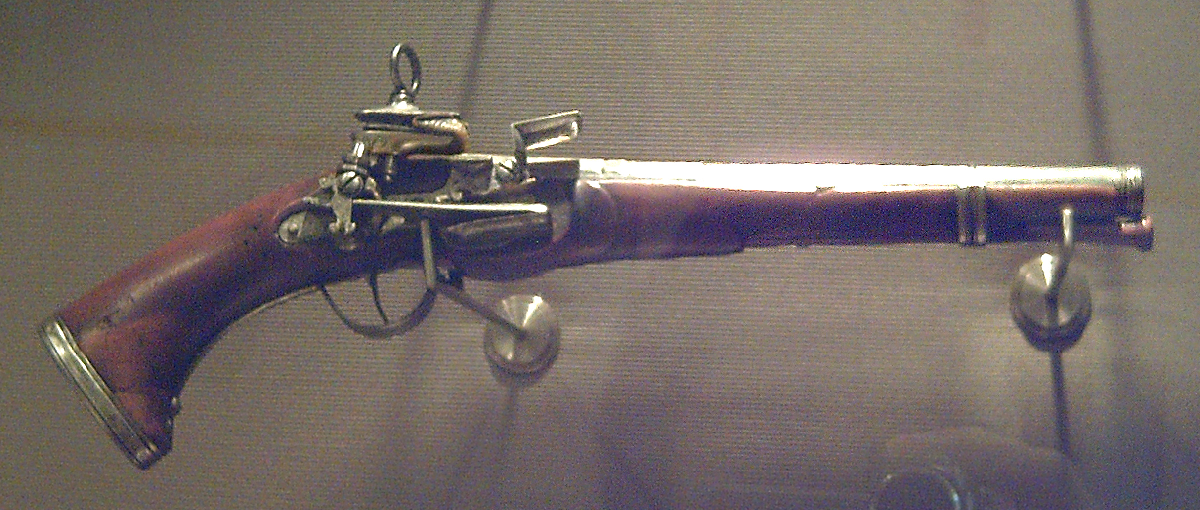 A miquelet horse-pistol.